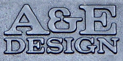 A&E Design, företagets logotyp på en produkt